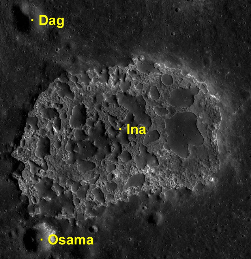 Cráter lunar Ina. (Imagen LRO)